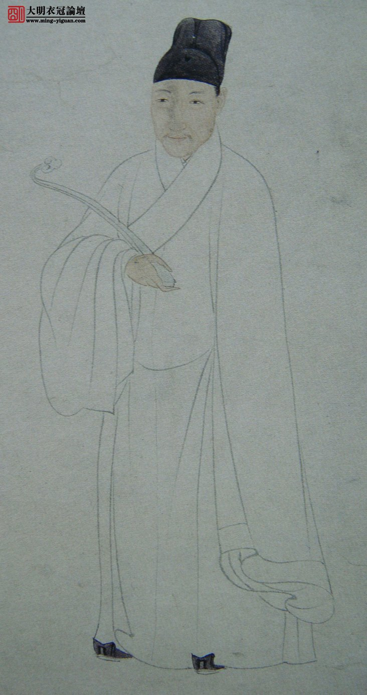 中文（香港）: 明代寫實容像